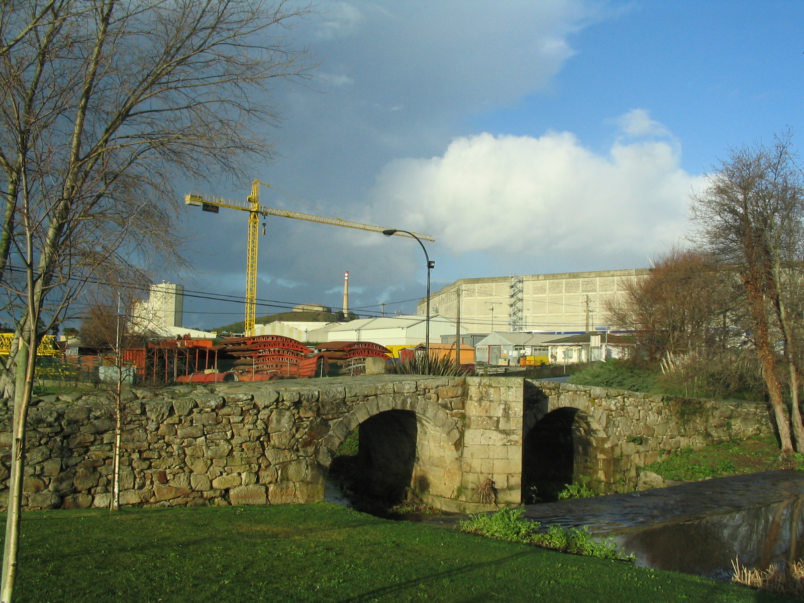 Ponte dos Brozos (Arteixo)